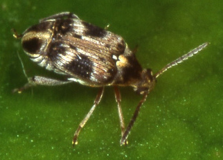 Female Callosobruchus maculatus